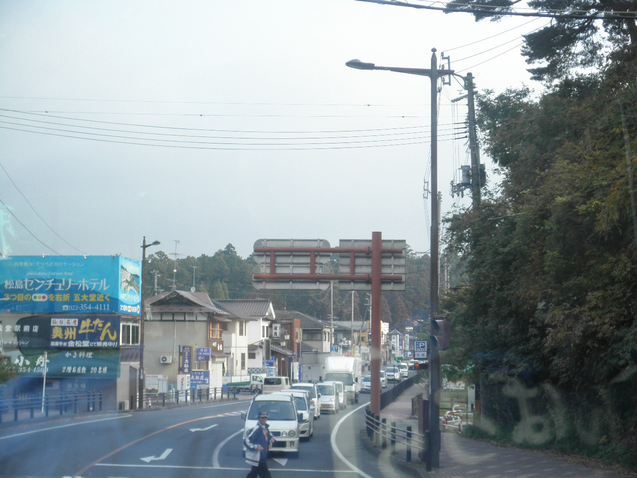 宮城県宮城郡松島町松島浪打浜